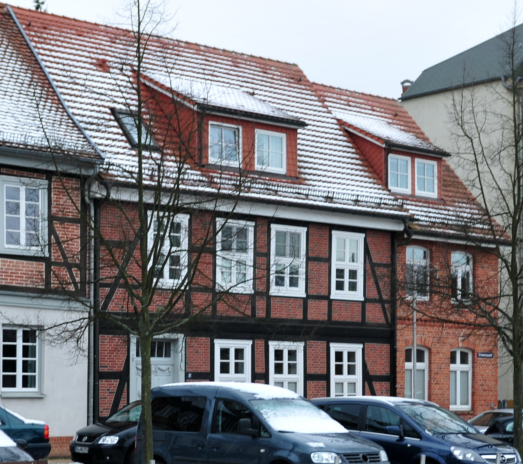 Denkmalgeschütztes Fachwerkhaus Schweinemarkt 3 in Schwerin, Mecklenburg-Vorpommern.